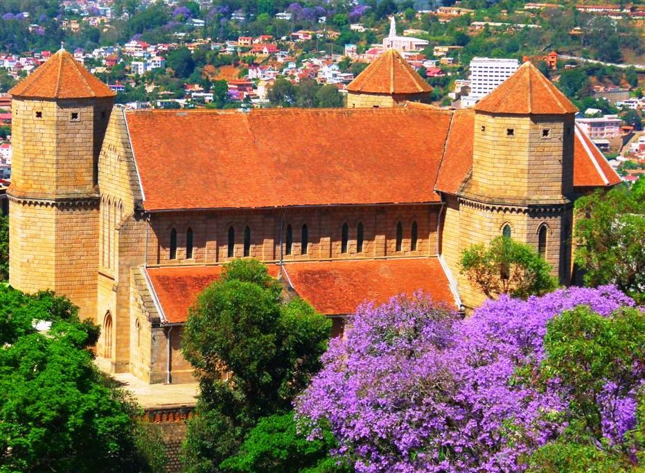 Cathédrale anglicane d'Antananarivo, Madagascar